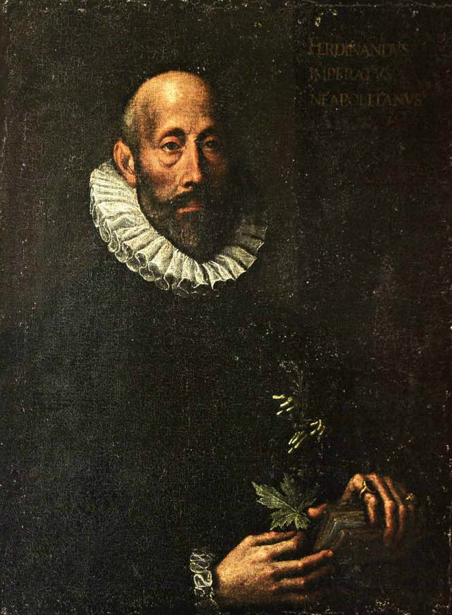 Ritratto di Ferrante Imperato